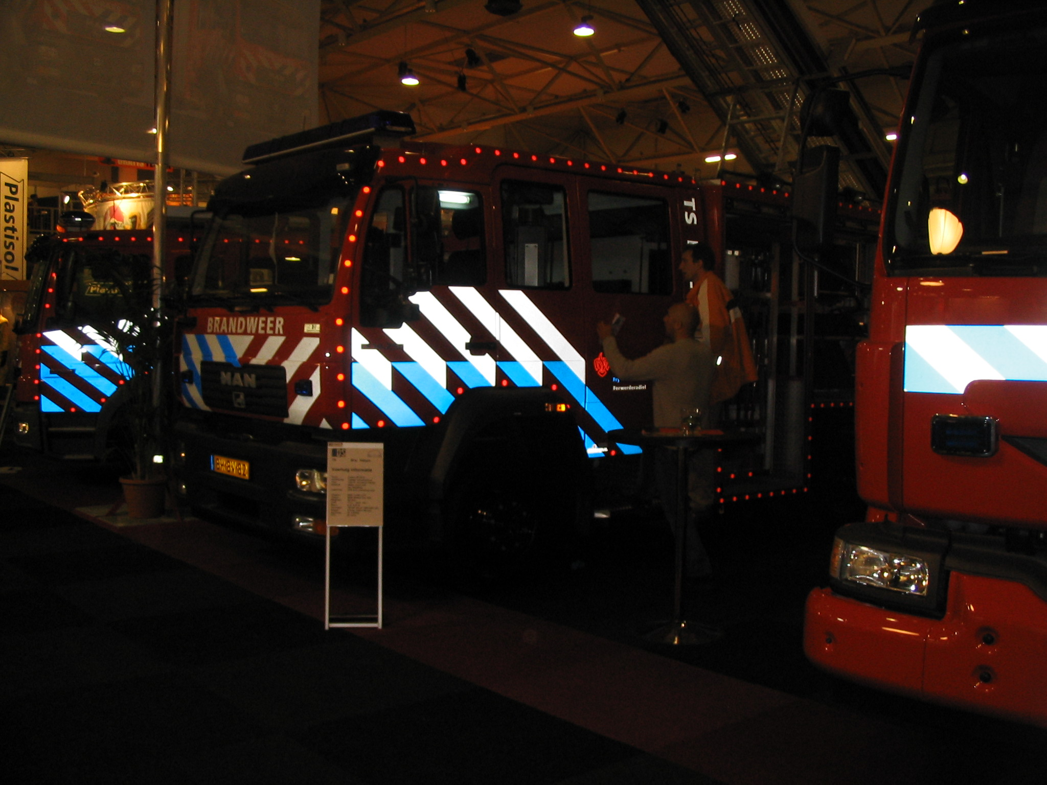 Eigen gemaakte foto